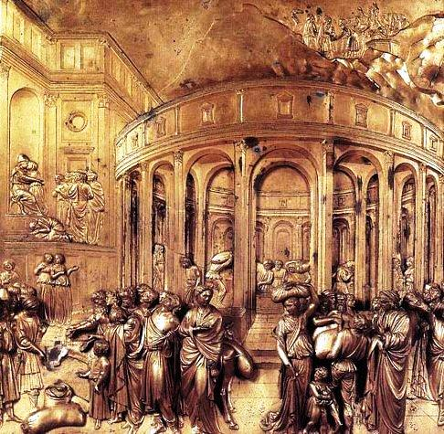 Lorenzo Ghiberti, Porta del Paradiso del Battistero di Firenze. Dettaglio. Tribunal of the two women